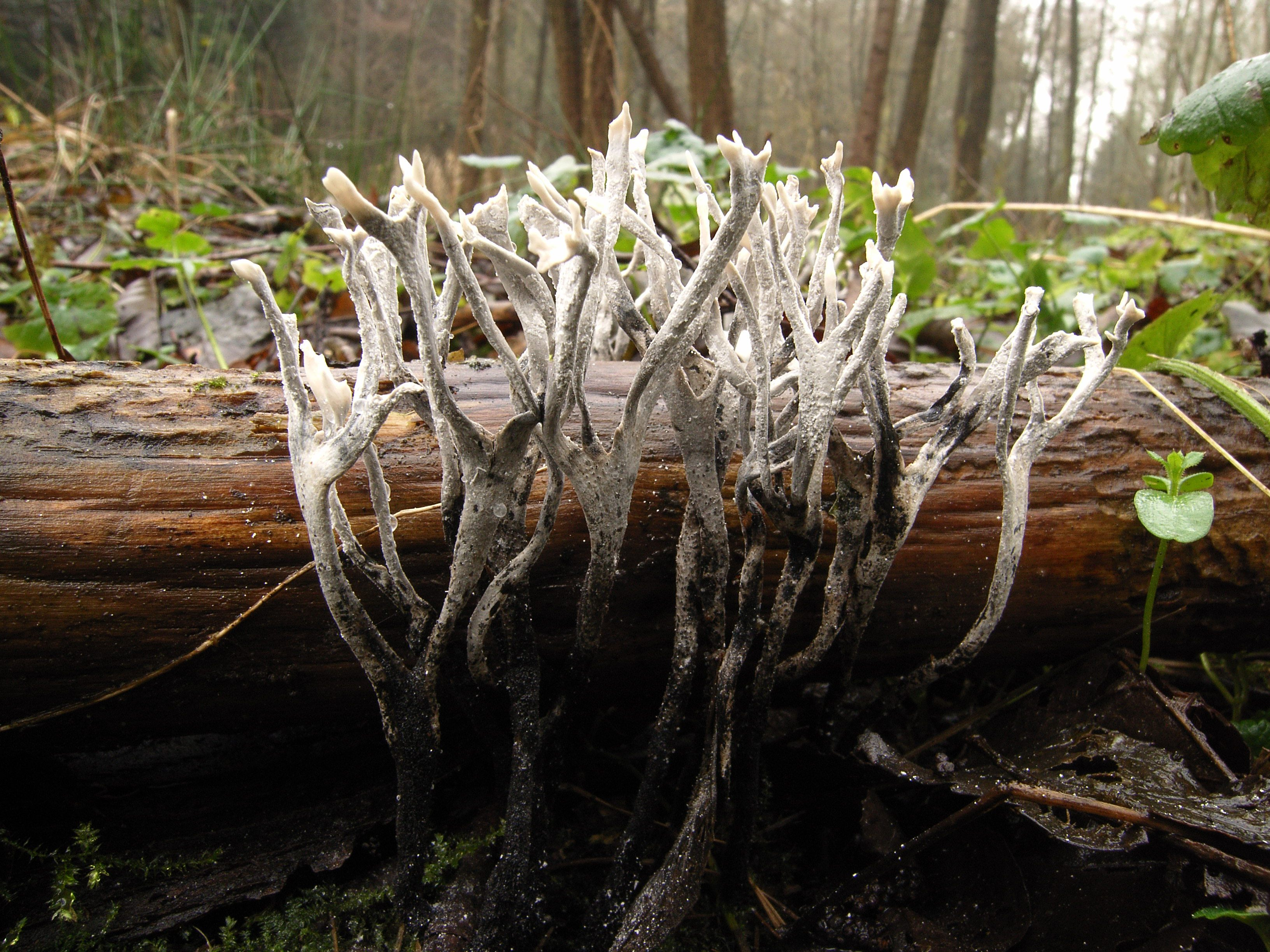 Geweihförmige Holzkeule (Xylaria hypoxylon)